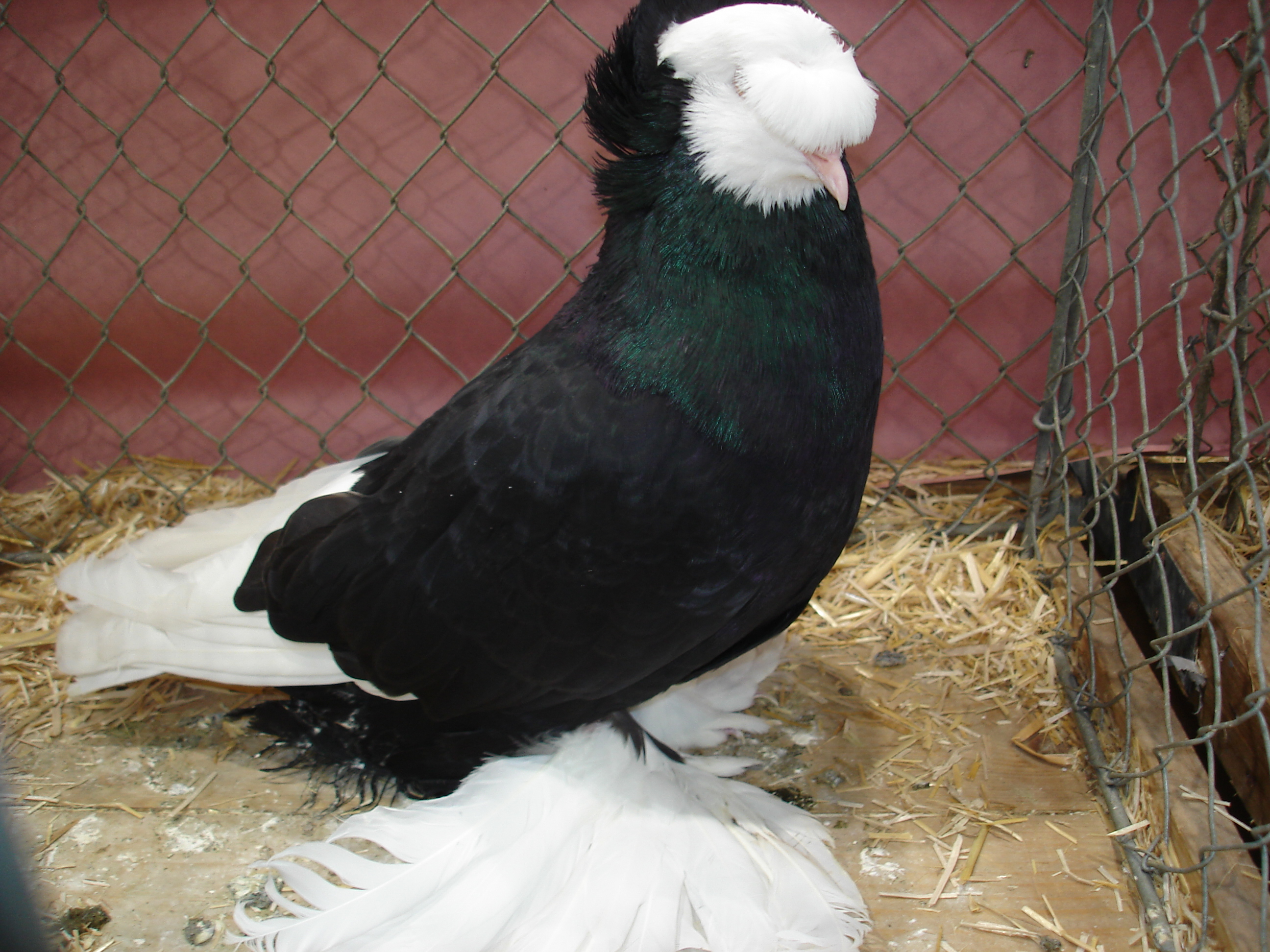 Zdjęcie